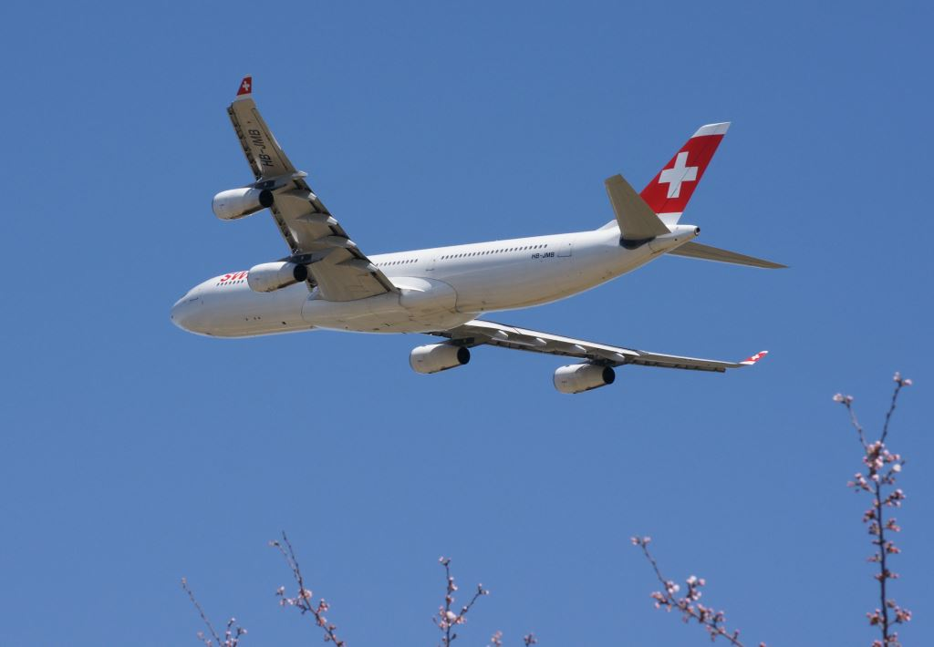 スイスインターナショナルエアラインズエアバスＡ340 成田便